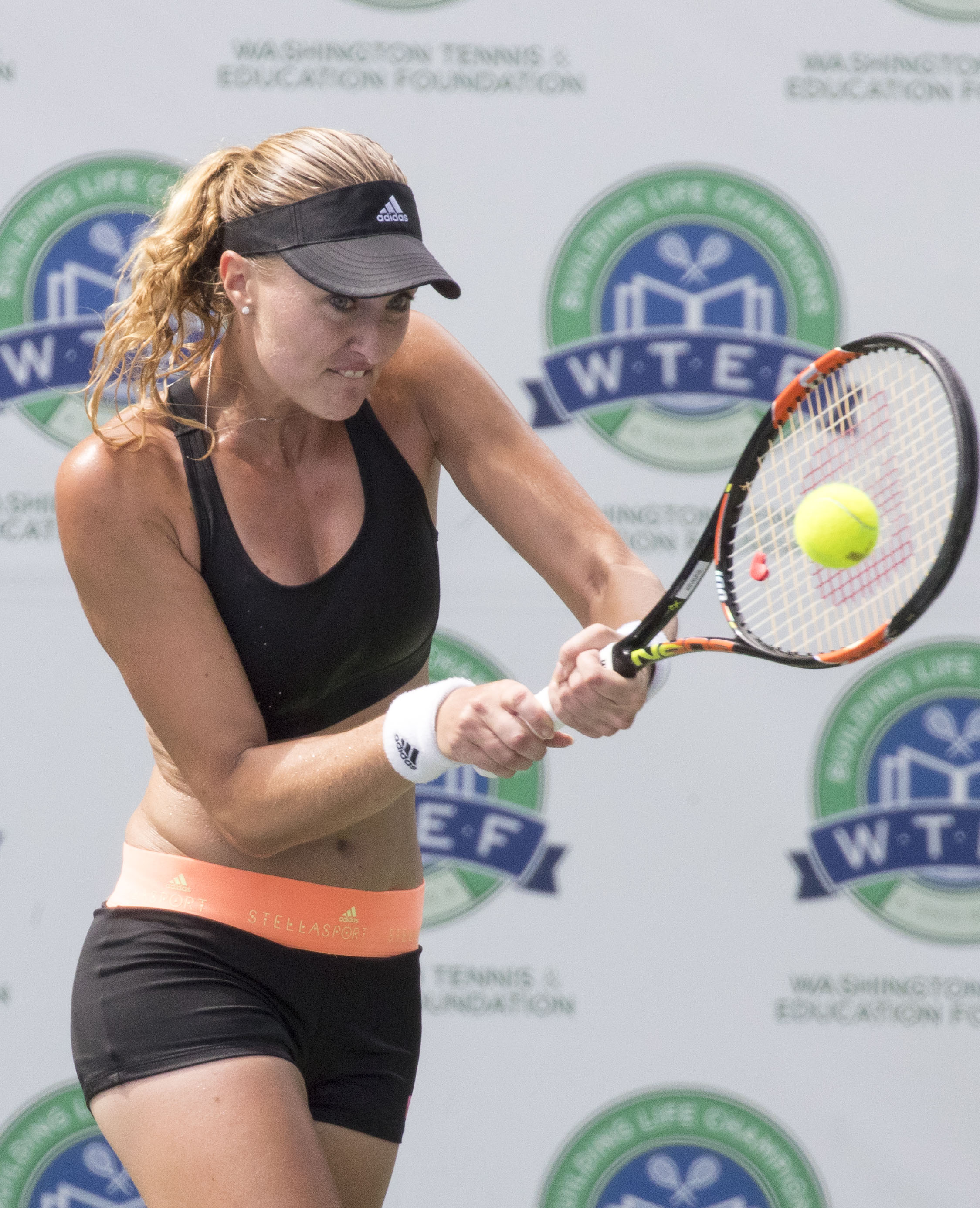 2016 Citi Open